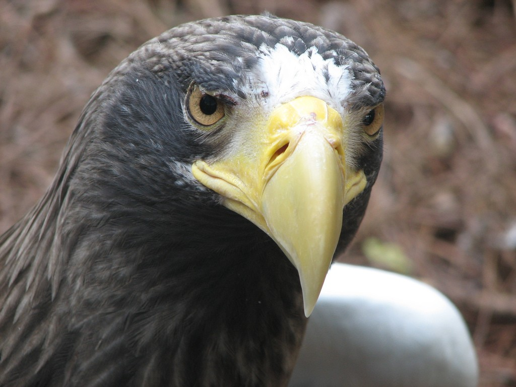 Stellars Sea Eagle at Louisville Zoo